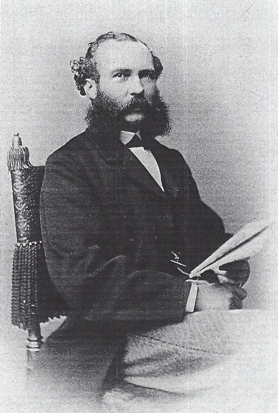 Fotografie von Ernst von Grävenitz